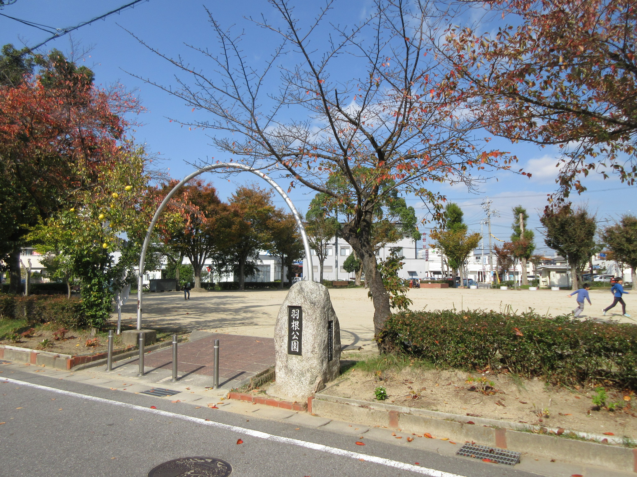 羽根公園（岡崎市羽根北町）